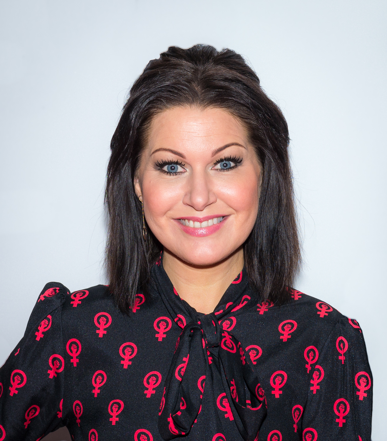 Susanne Delastacia inför prisutdelningen på Stockholms internationella filmfestival den 16 november 2018.